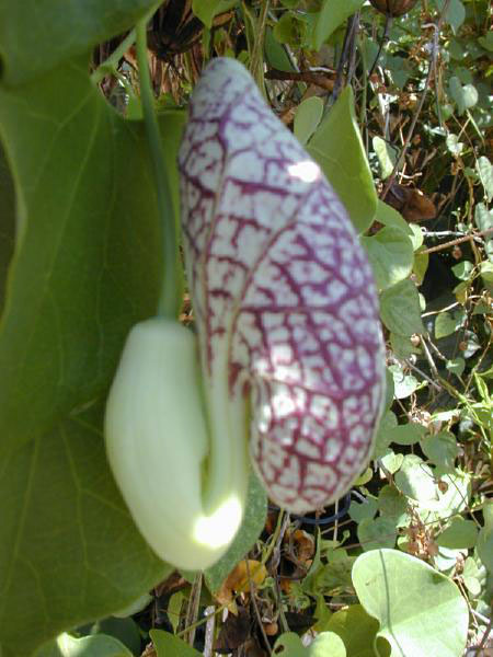 Aristolochia littoralis (Calico Flower)